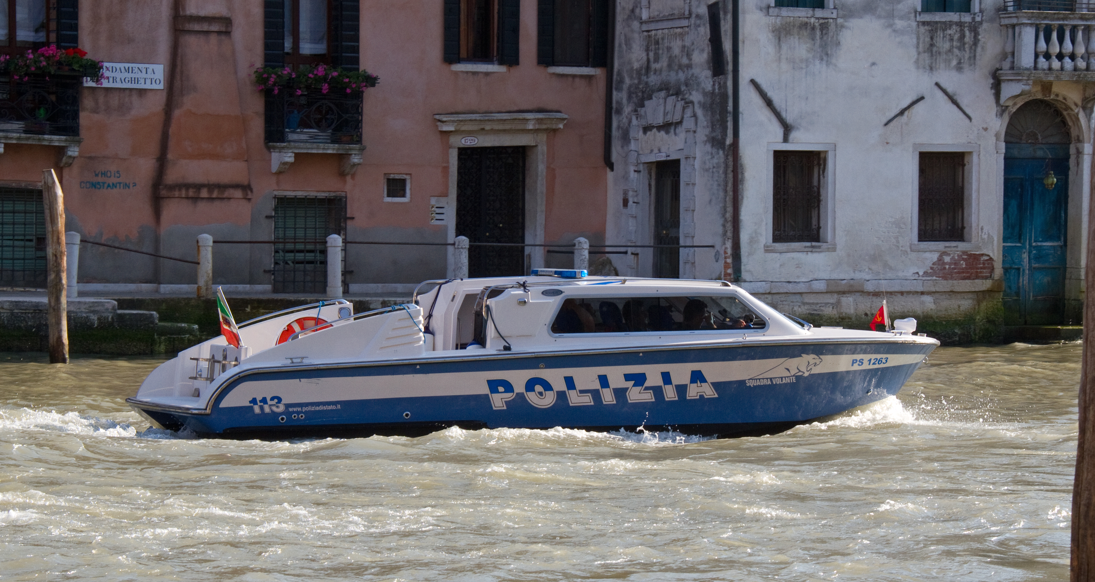 Police Boat